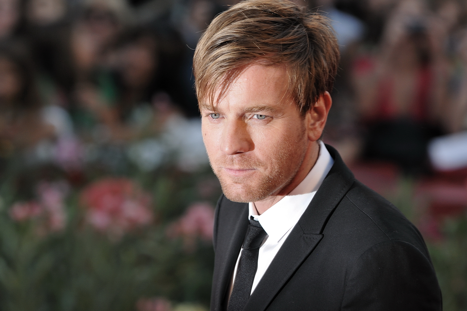 66ème Festival du Cinéma de Venise (Mostra), 6ème jour (07/09/2009) Tapis Rouge avec George Clooney et Elisabetta Canalis, Ewan McGregor et le réalisateur Grant Heslov pour le film : The men who stare at goats